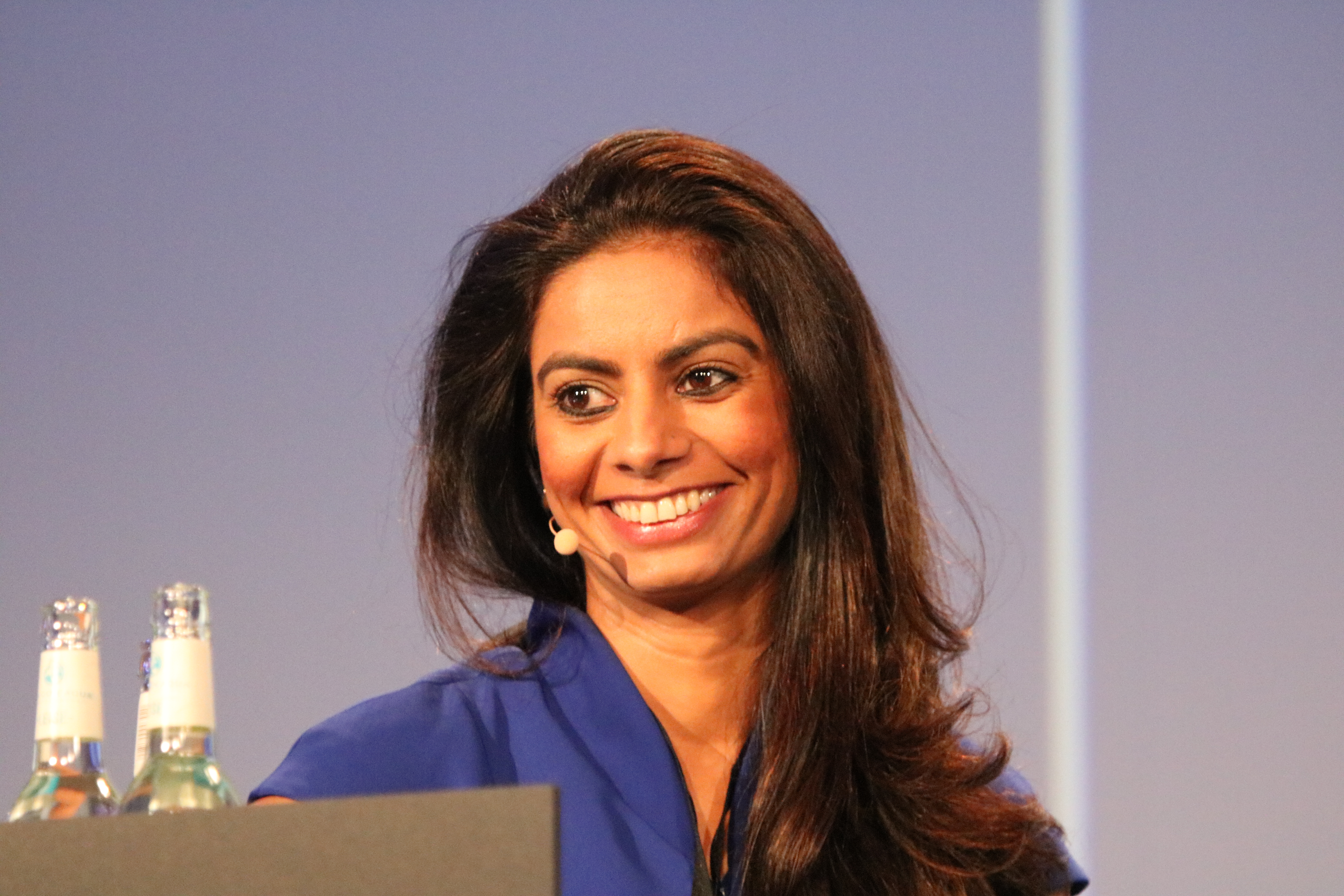 Mishi Choudhary Twitter: Video